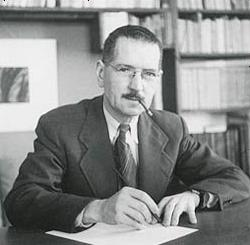 Gérard Morisset dans son bureau de travail personnel. Fonds de l'Inventaire des œuvres d'art, ministère de la Culture, des Communications et de la Condition féminine, Portraits cote F-11